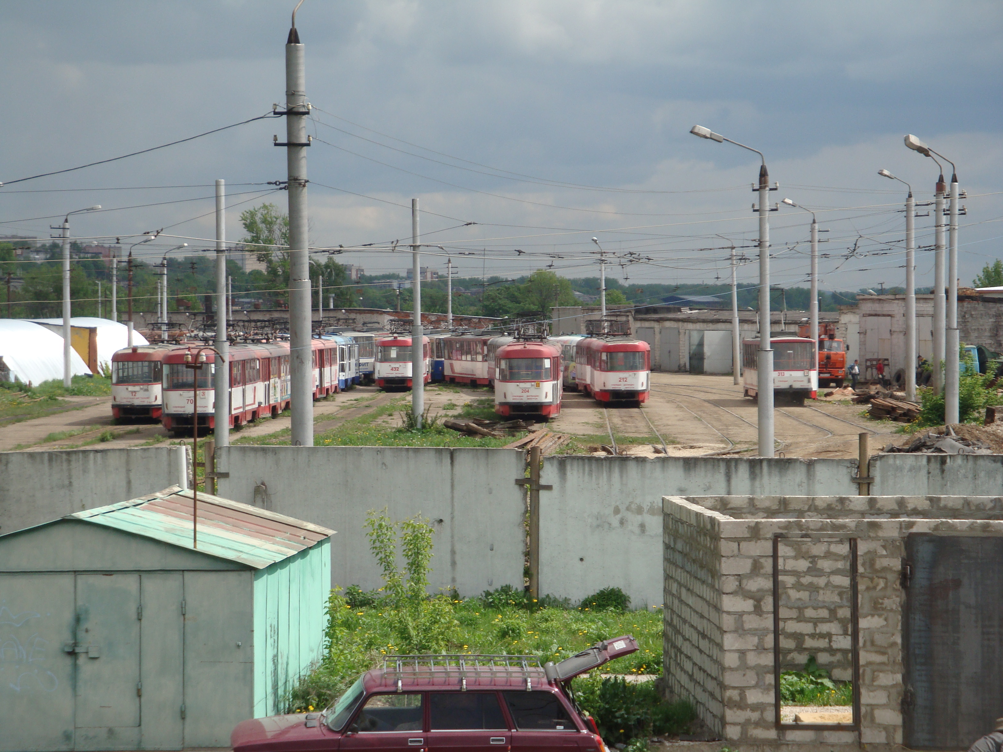 Веер трамвайного депо "Криволучье" в Туле